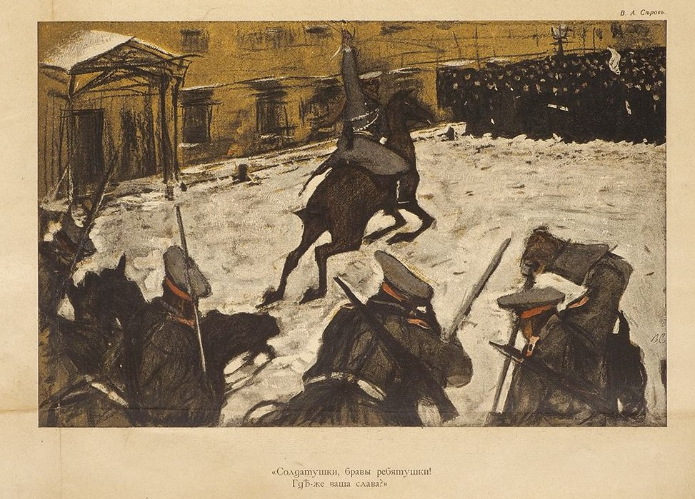 Жупел. Журнал художественной сатиры. № 1 за 1905, № 3 за 1906. СПб.: Тип. Р. Голике и А. Вильборг, 1905-1906. № 1: 10, II с., ил. № 3: 12 с., ил. 35,5 х 28 см. В издательских иллюстрированных обложках. Обложка № 1 оформлена Иваном Билибиным. Надрывы краев, заломы, блоки распадаются на страницы. Редактор З.И. Гржебин, издатель С.П. Юрицын. Номера были конфискованы и уничтожены, а сам журнал запрещен. Первый номер вышел двумя изданиями, однако каждый номер является большой редкостью. В журнале участвовали: Горький, Бунин, Куприн, Анисфельд, Билибин, Лансере, Серов и др. Традиционно композиция связывается с событиями 9 января 1905 г. в Петербурге. По предположению И.С.Зильберштейна и В.А.Самкова, изображен разгон демонстрации в Москве, близ Училища живописи, ваяния и зодчества в октябре 1905.